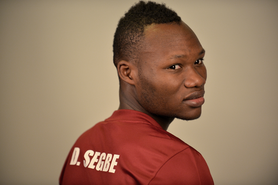 Désiré Sègbè Azankpo est né le 6 Mai 1993 au Bénin. Du haut de ses 21 ans, il est international béninois depuis le 17 Mai 2014. Ses prouesses techniques, ses conduites de balle, sa puissant athlétique, sa lourde frappe, sa pointe de vitesse phénoménale et ses passements de jambes hors pairs ont poussés le sélectionneur des Ecureuils du Bénin a lui confié la pointe de l’attaque de l’équipe nationale du Bénin.